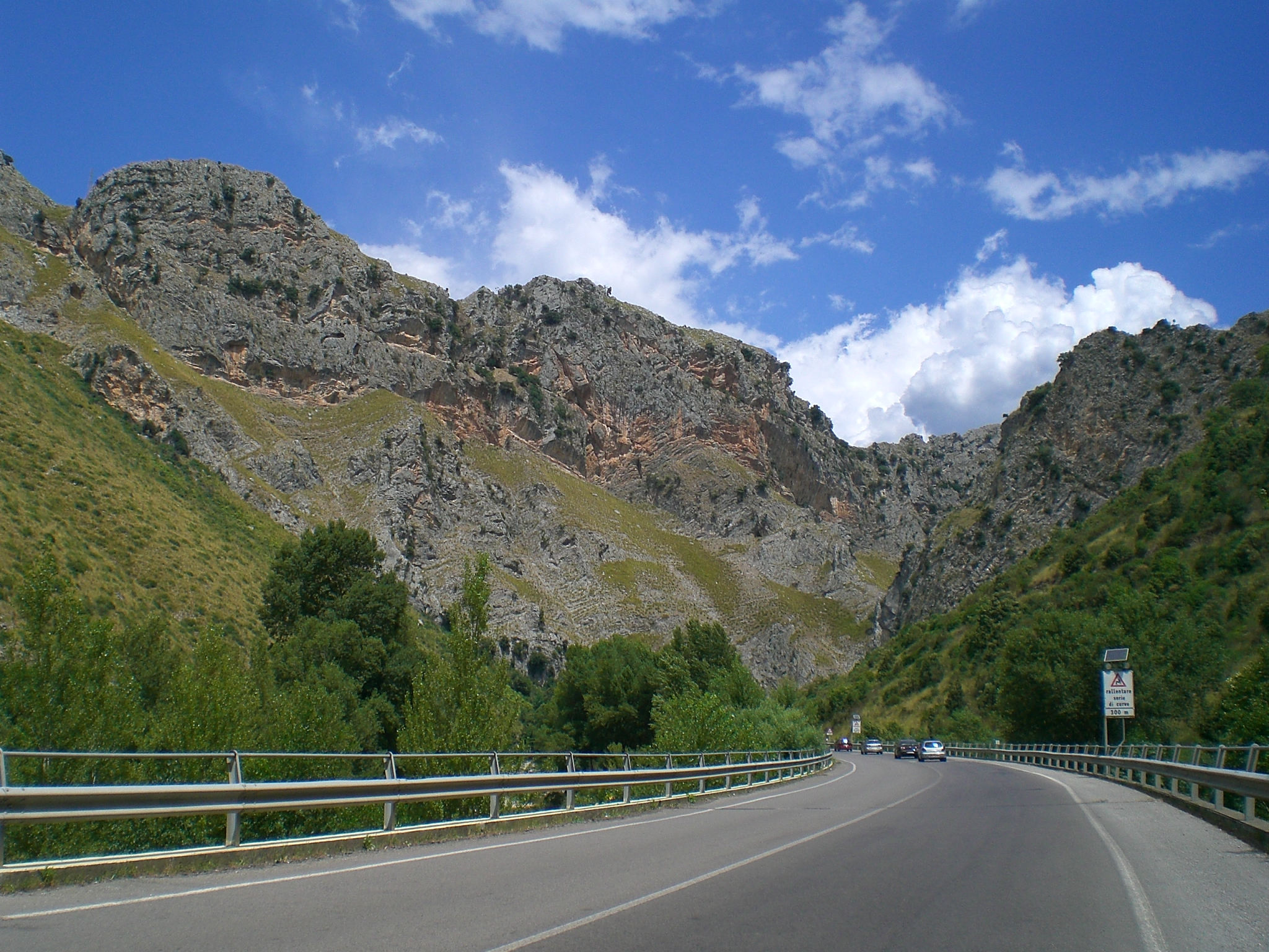 Valle del Mingardo e Strada regionale 562dir del Golfo di Policastro. Parco nazionale del Cilento, Vallo di Diano e Alburni.